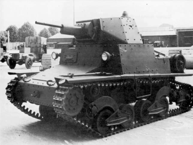 Carro Armato L6/40